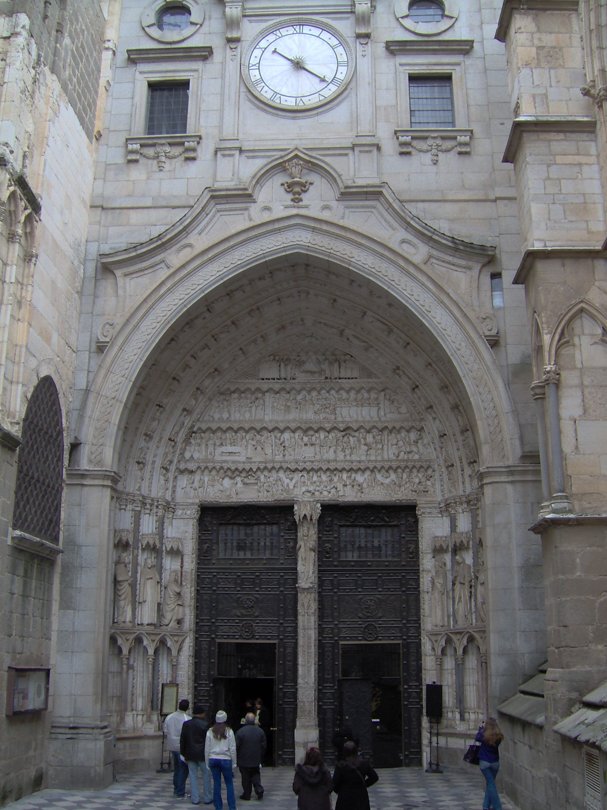 Puerta del Reloj de la Catedral de Toledo (España)